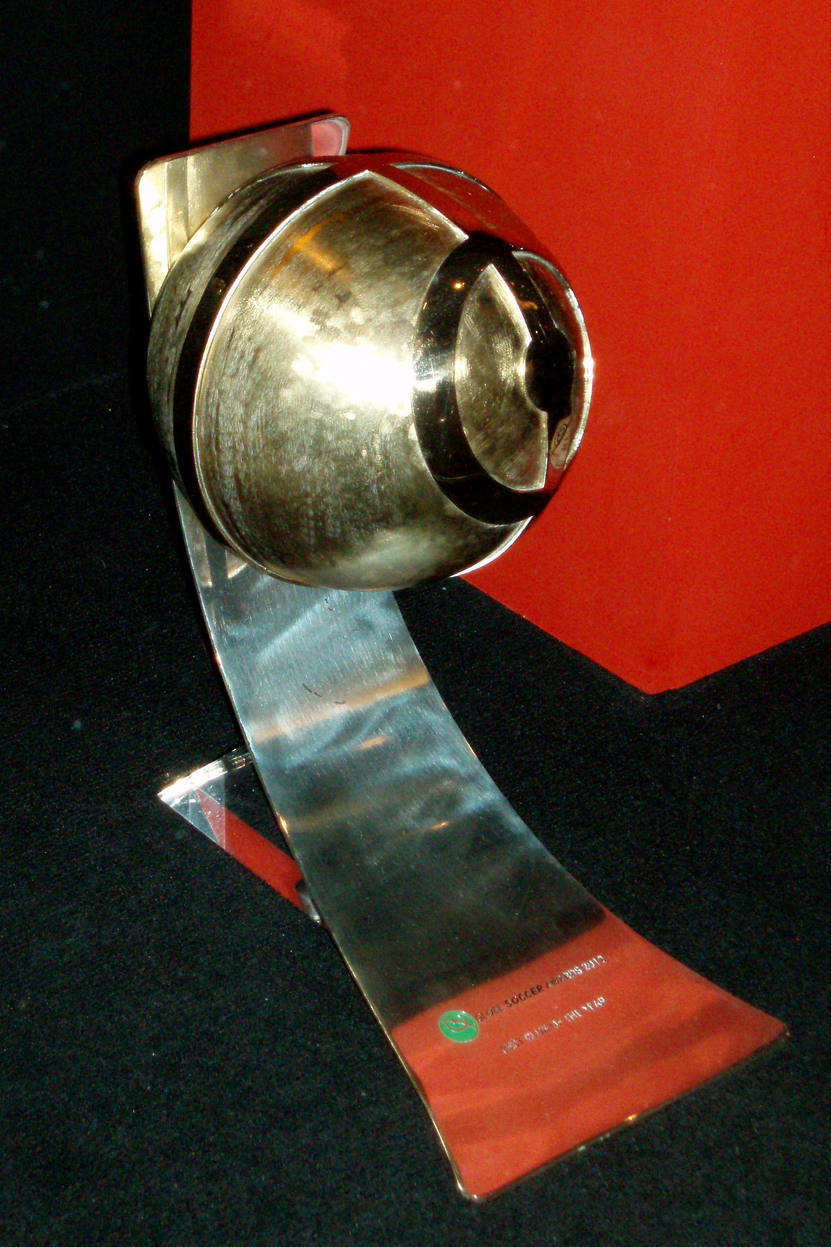 Premio Globe Soccer al mejor club del año 2012.